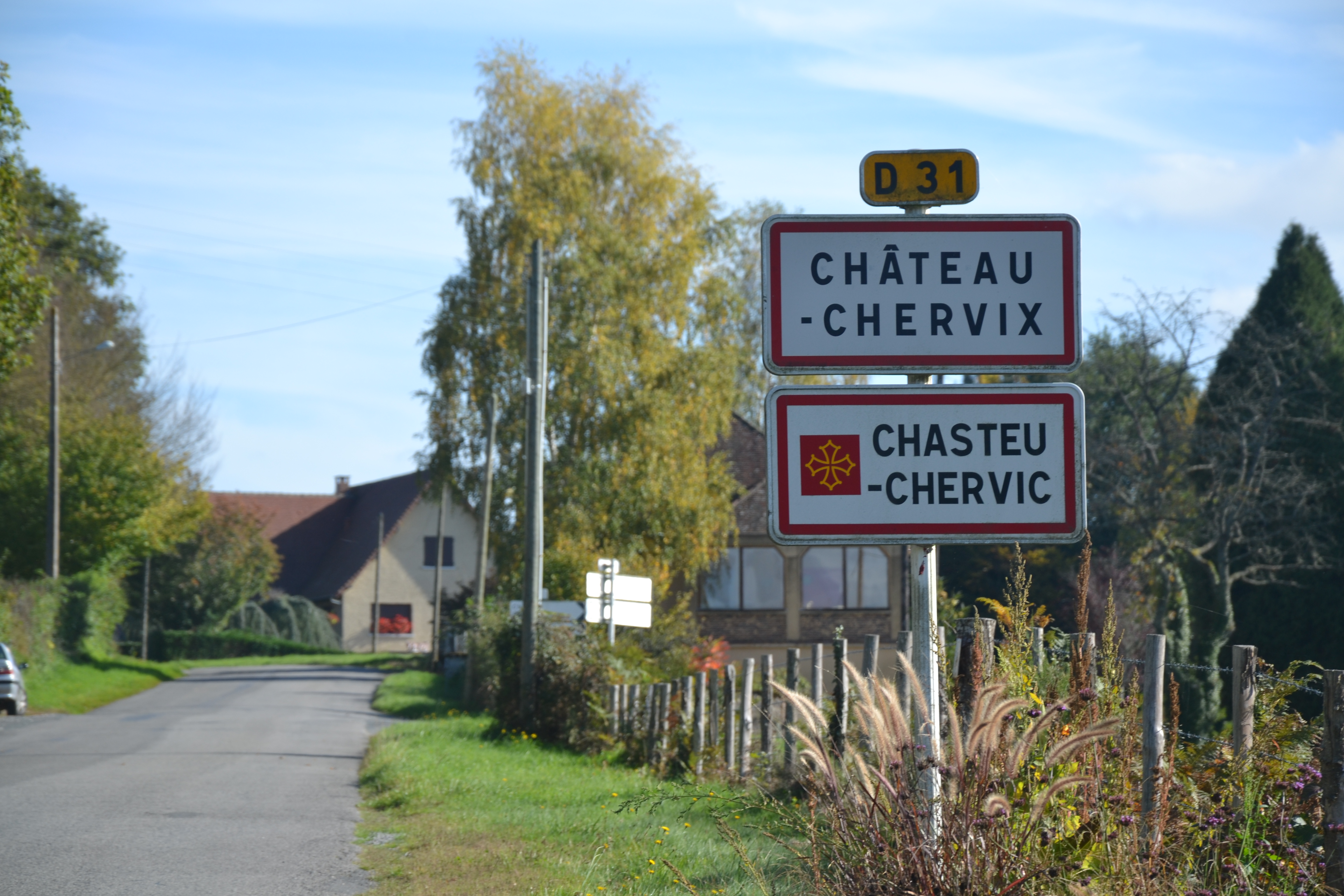 Panneau bilingue français-occitan à Château-Chervix (Haute-Vienne, France).